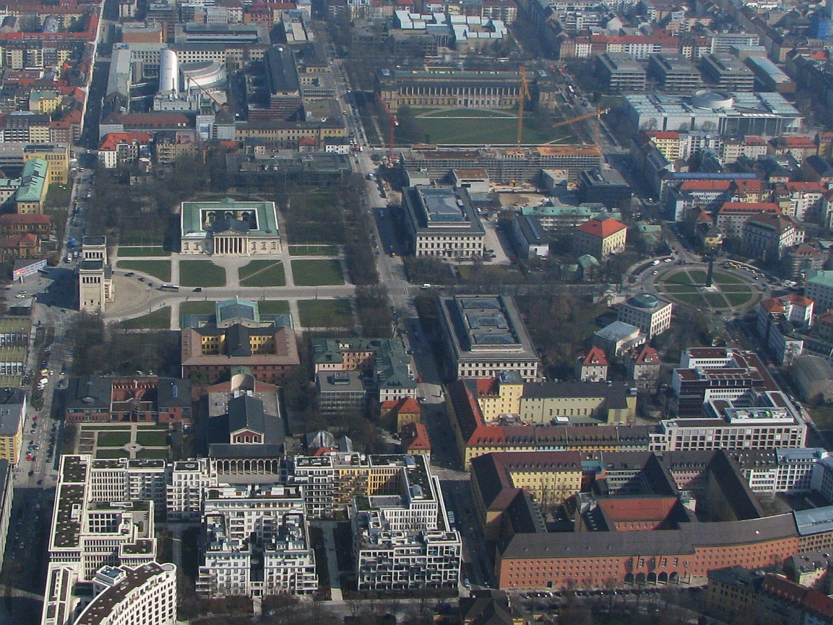 Luftbild Kulturdenkmal-Ensemble Brienner Straße Maxvorstadt München (Bayern) vom Königsplatz links bis Karolinenplatz rechts in Bildmitte mit Ensemble der Brienner Straße Propyläen Klassizismus Torbau Königsplatz Glyptothek Staatliche Antikensammlung Hochschule für Musik Staatliche Graphische Sammlung Karolinenplatz Obelisk Amerika-Haus Börse - Foto Wolfgang Pehlemann DSCN2431This is a photograph of an architectural monument.